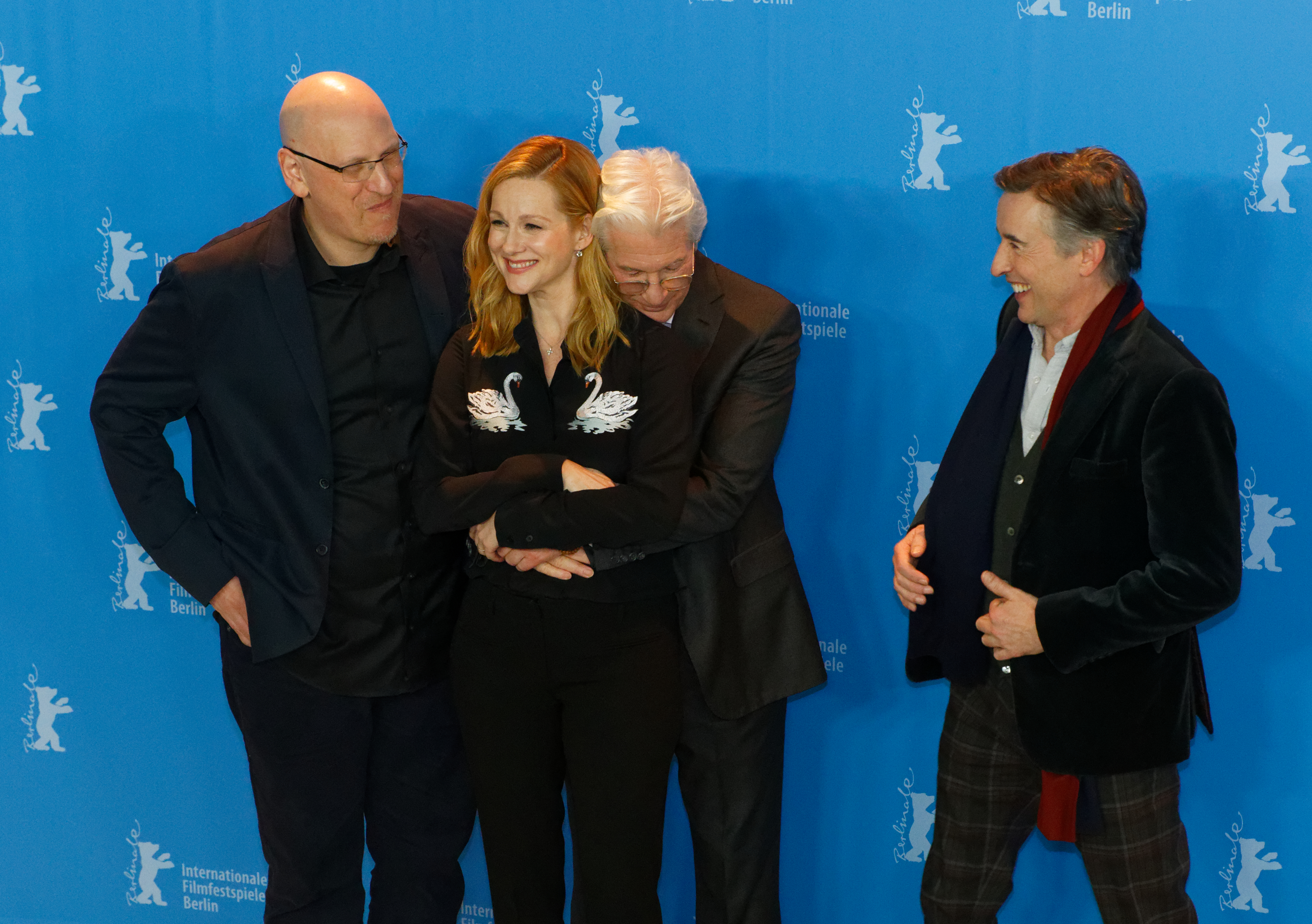 Oren Moverman & Cast von The Dinner bei der Berlinale 2017